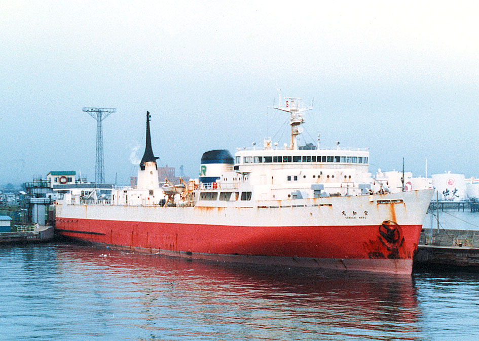 JR北海道 青函連絡船 空知丸